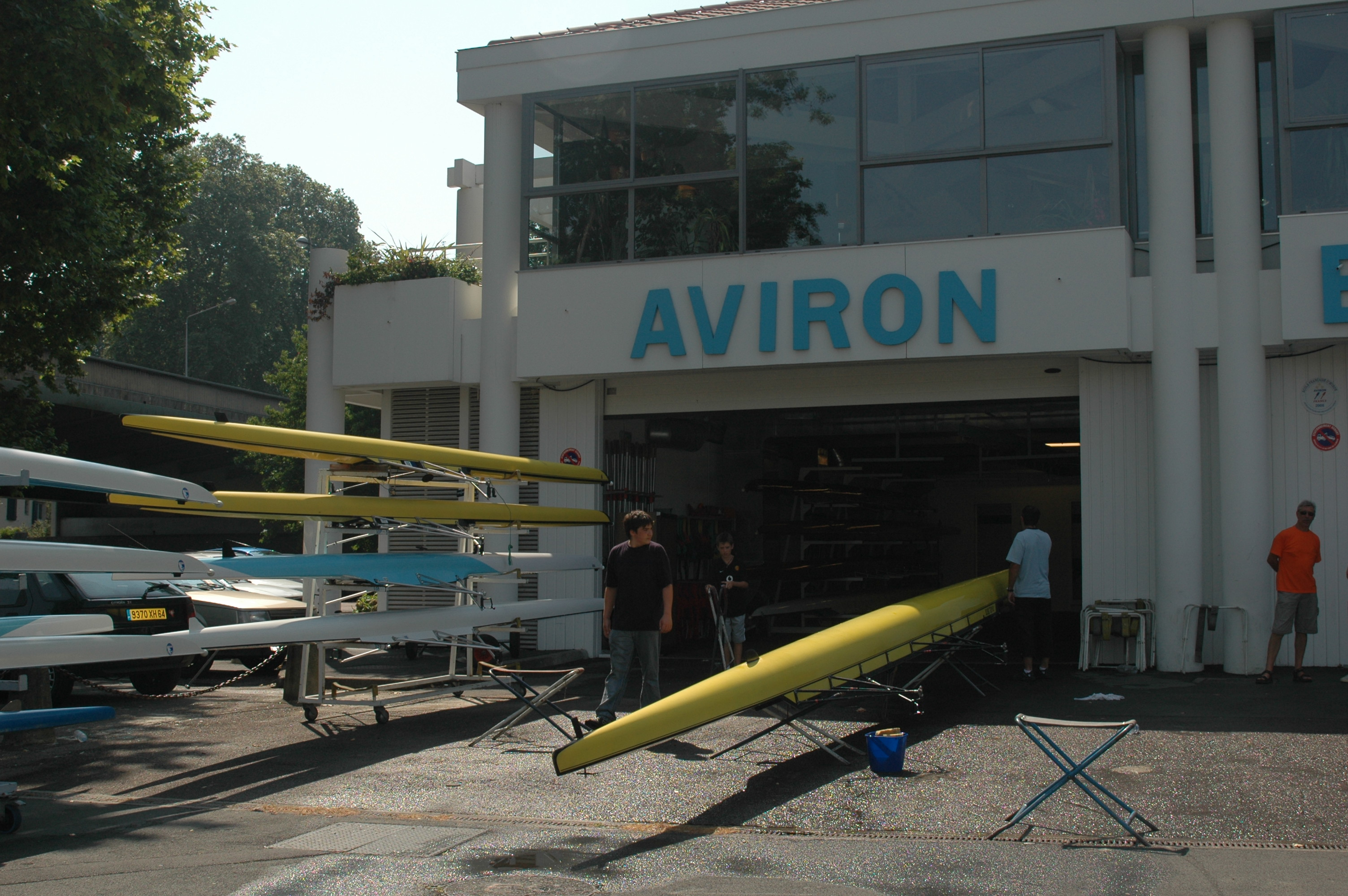 Bayonne, Aviron bayonnais, section aviron. Photo prise le 15/07/06 par Harrieta171